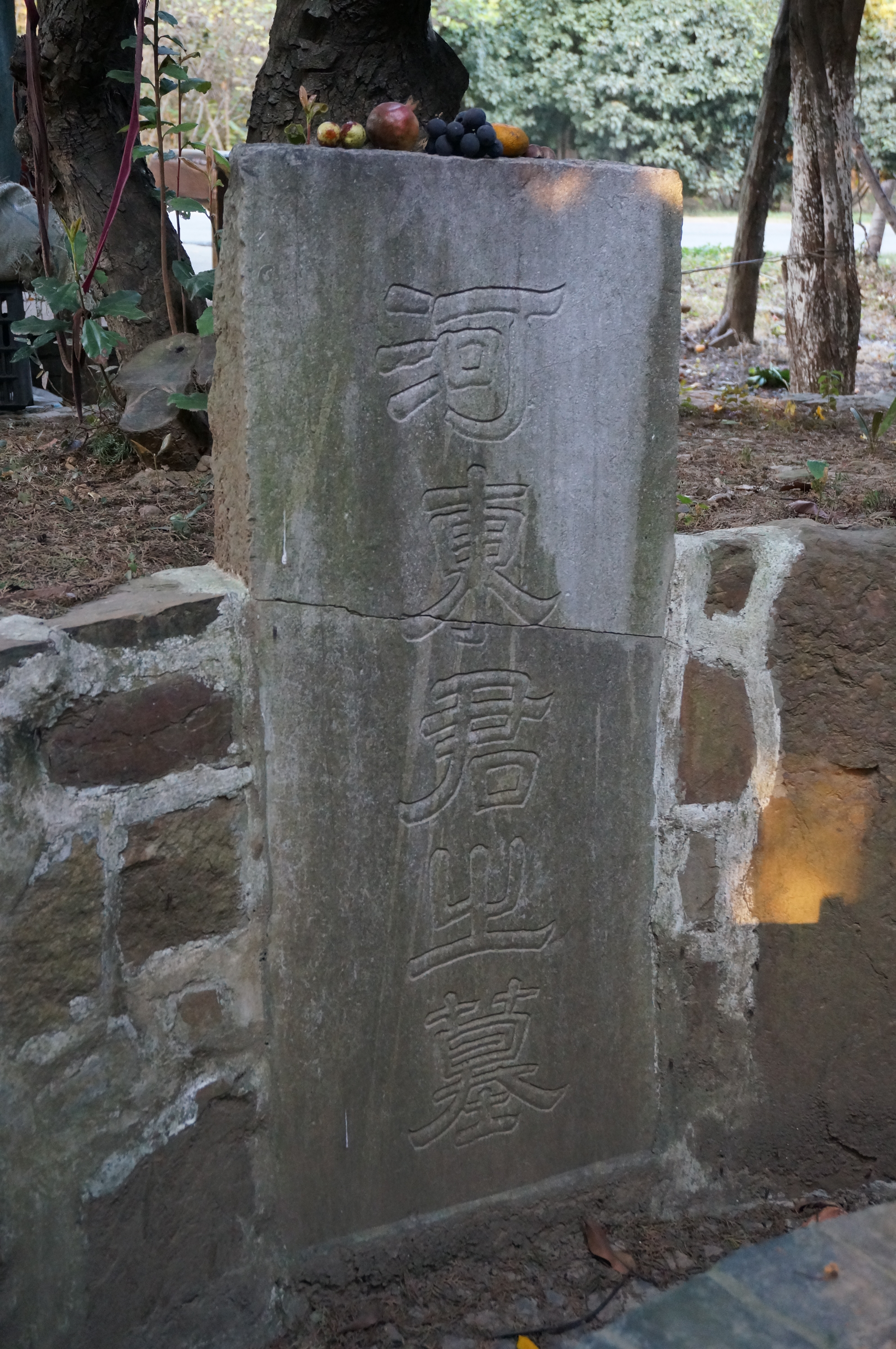 柳如是墓，墓碑。